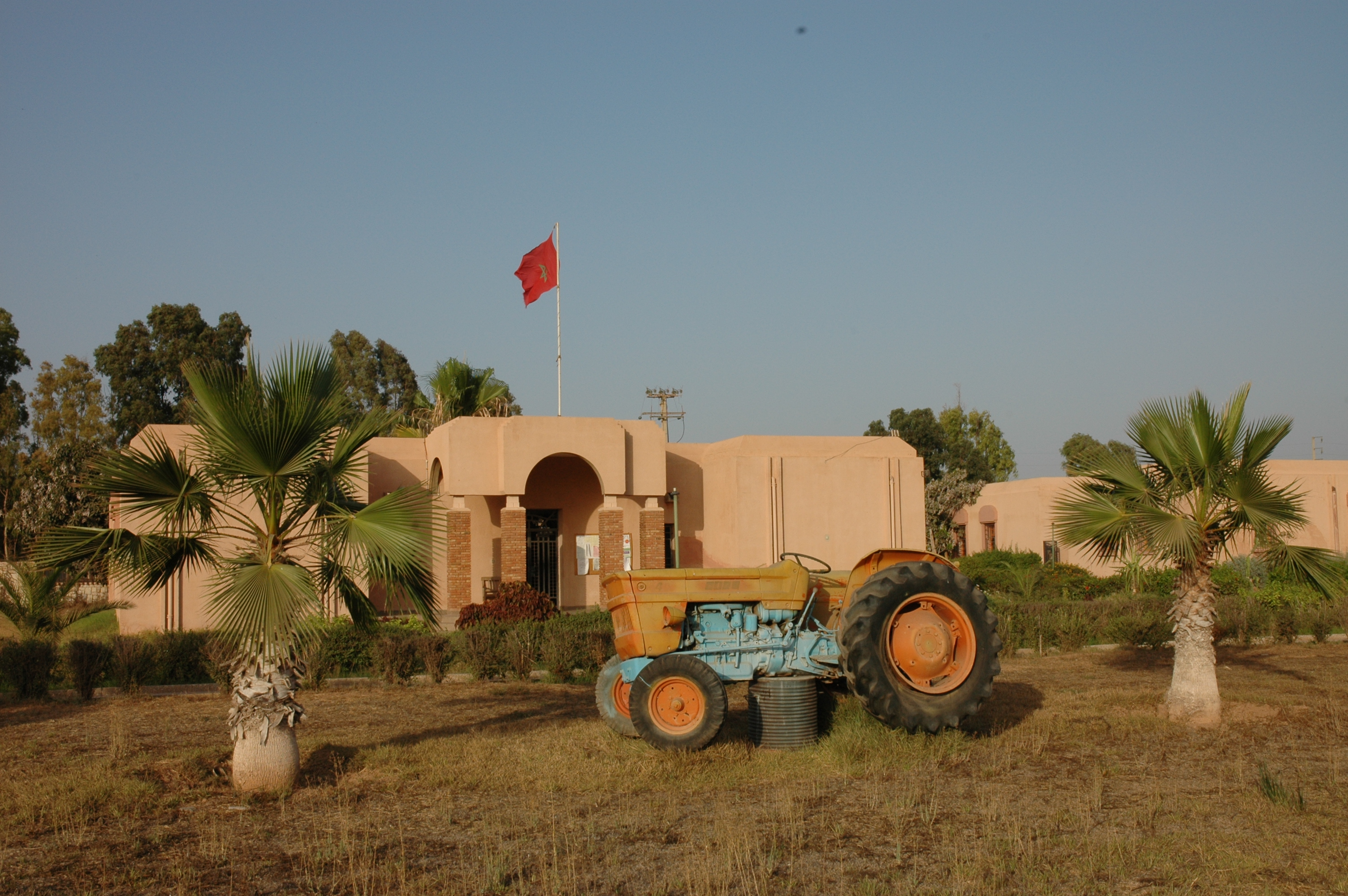 Institut de techniciens agricoles - Ouled Teima